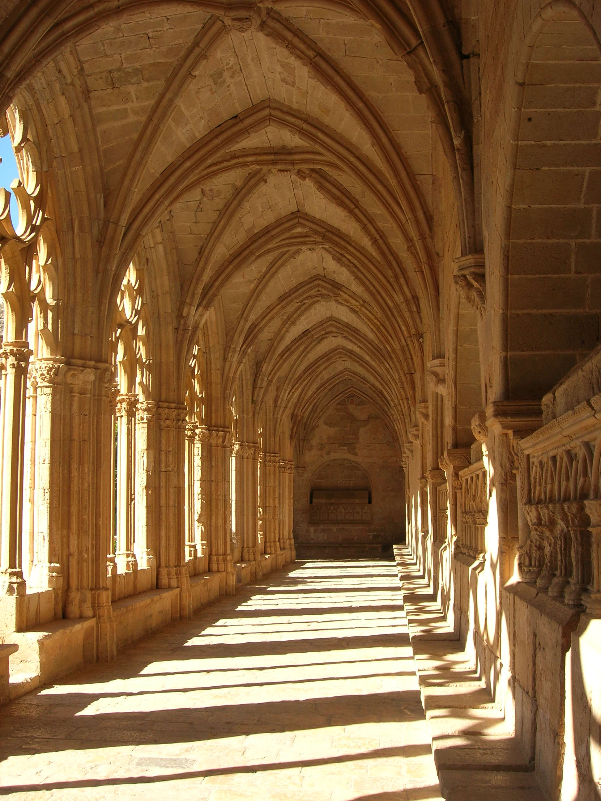 Monastère de Santes Creus, Catalogne, Espagne.